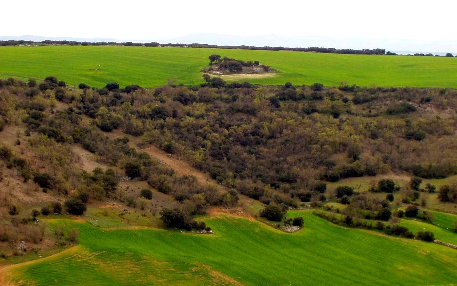 Corrales de Duero. Valladolid. Los Prados. Vista desde El Monte de San Llorente.